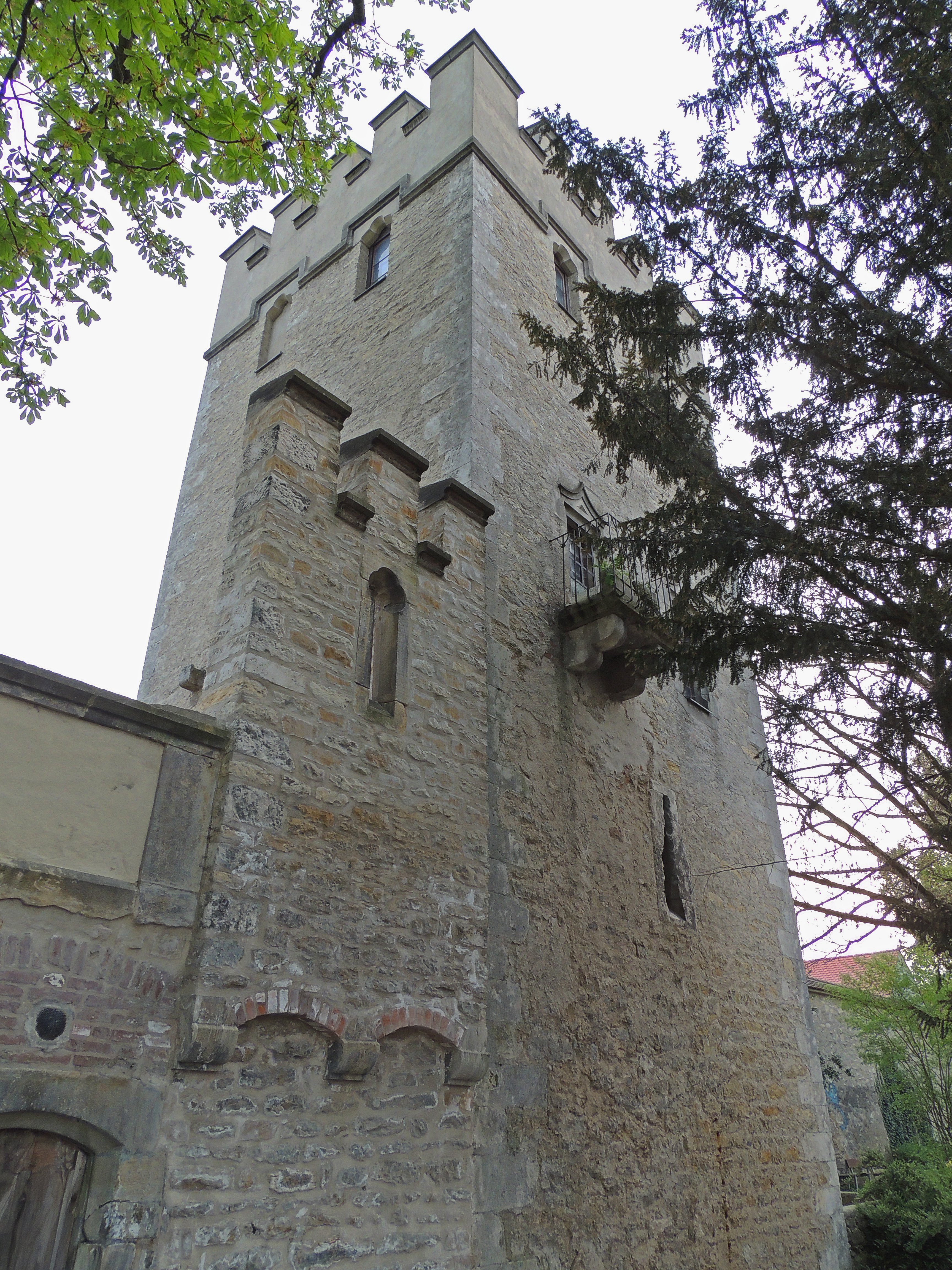 Der Anatomie- oder Pulverturm ist ein ehemaliger Turm der mittelalterlichen Stadtmauer Regensburgs aus dem 14. Jahrhundert . Er war der östlichste Turm der Donaumauer und hatte die Nummer XVI. Seit 1739 wurden darin anatomische Studien betrieben („theatrum anatomicum“), seit 1812 war er ein Pulverturm des Militärs, woher die heutigen Bezeichnungen rühren. Seit 1853 ist er Bestandteil des Parks der Königlichen Villa.This is a photograph of an architectural monument.